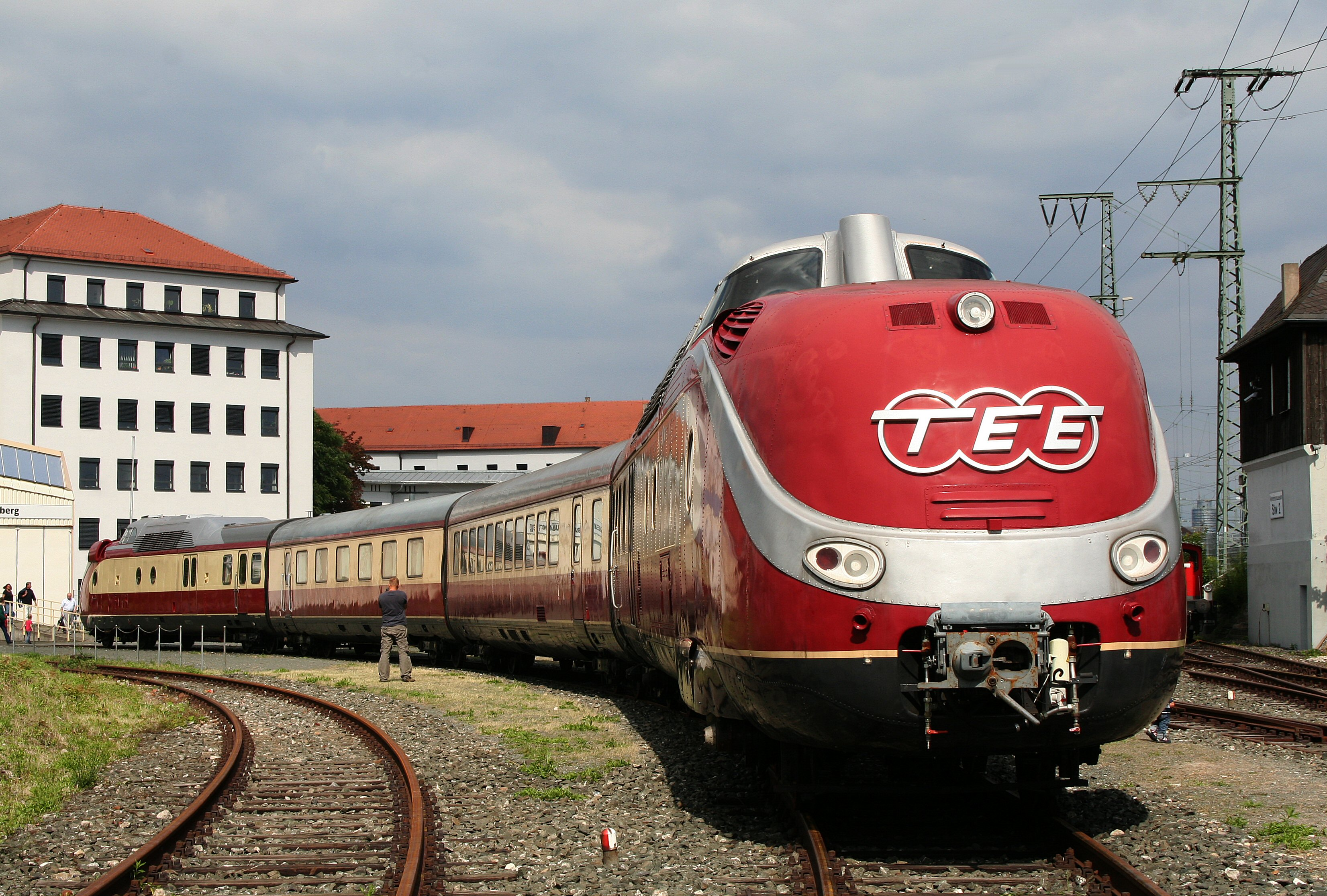 Der Trans Europ Express VT 602 003 am Ende des Zugs, ausgestellt auf dem Freigelände des DB Museum Nürnberg.